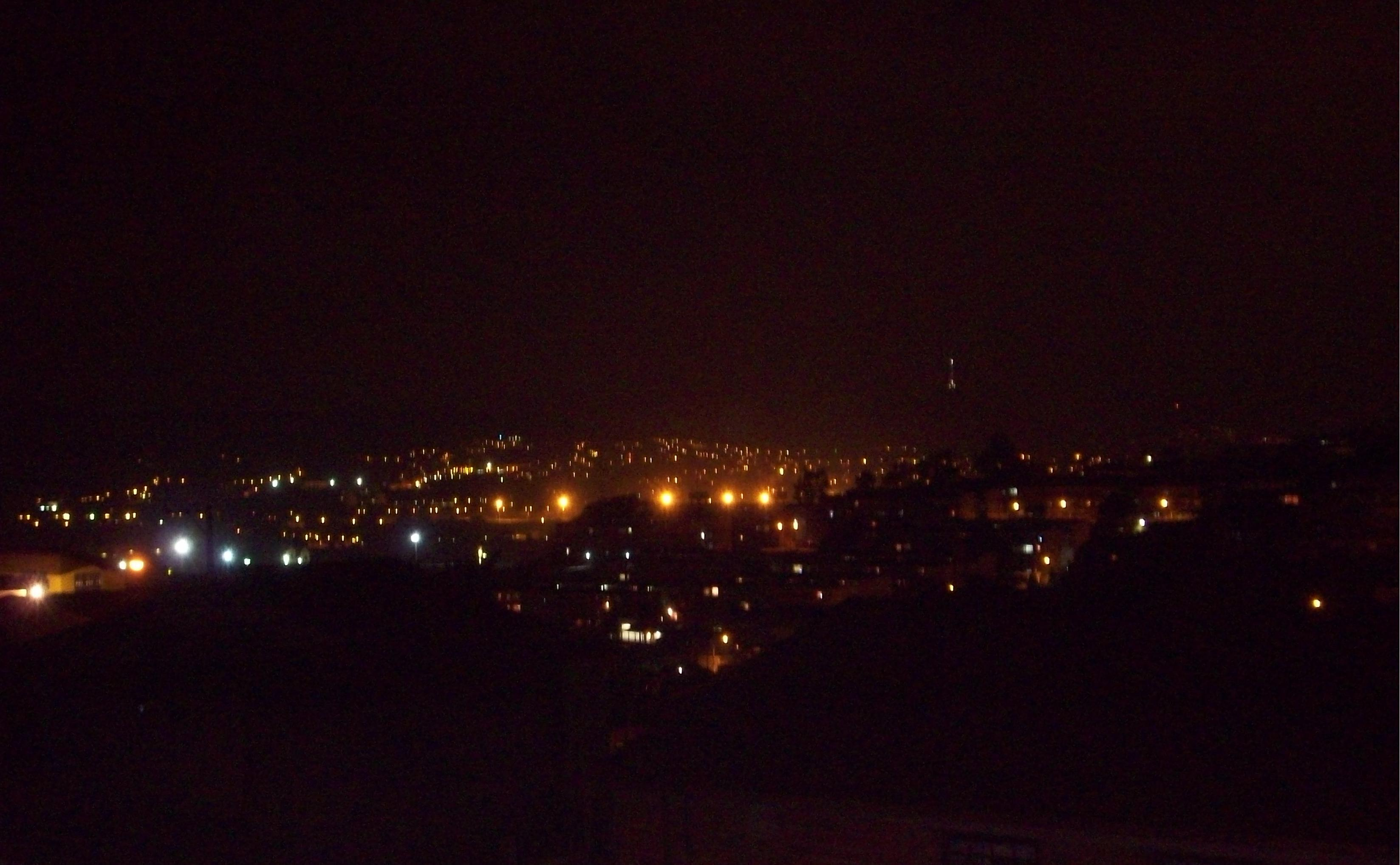 Carapicuíba picture